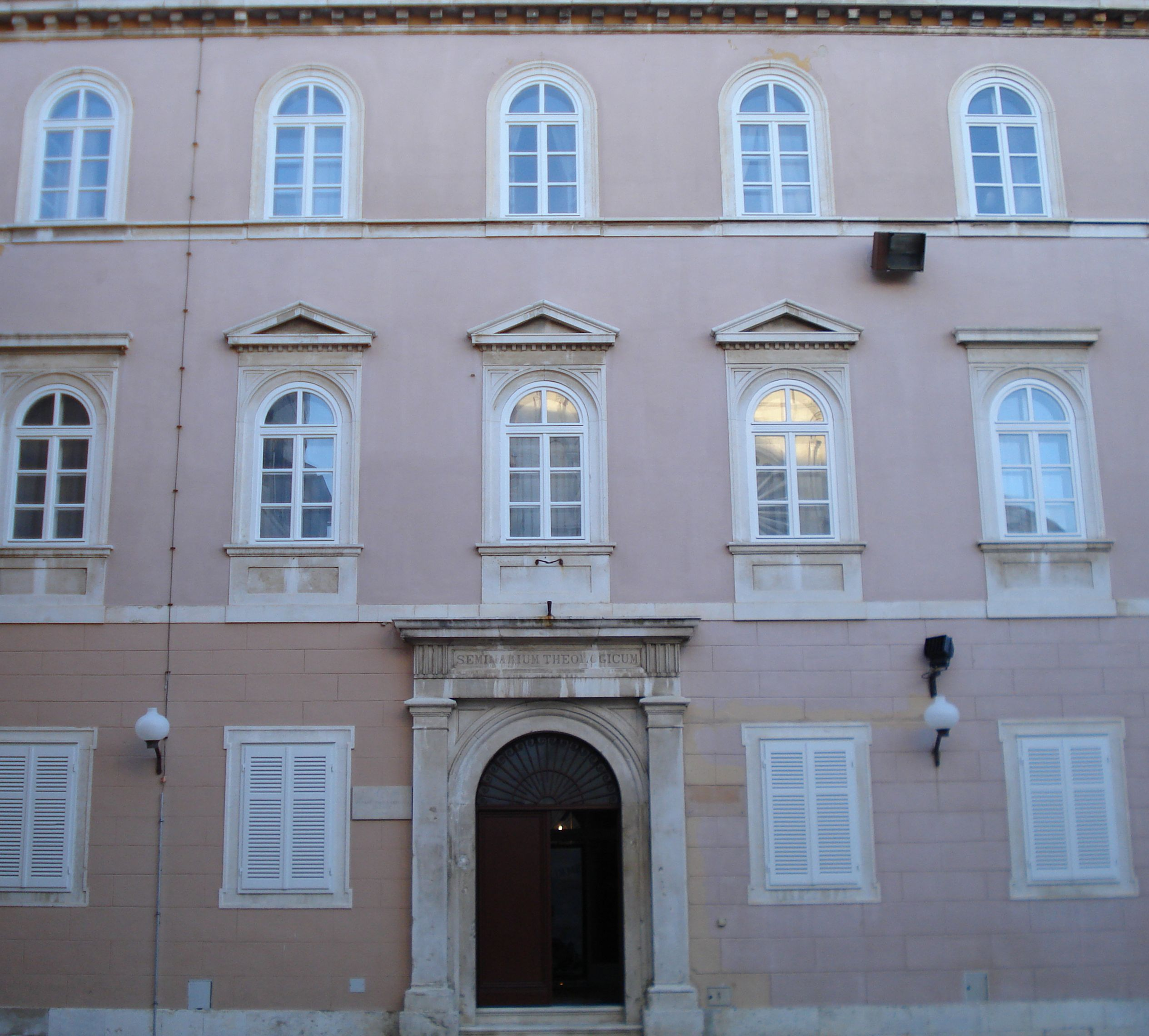 Sjemenište Vicka Zmajevića